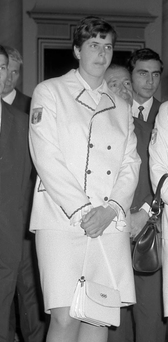 Mihaela Peneș